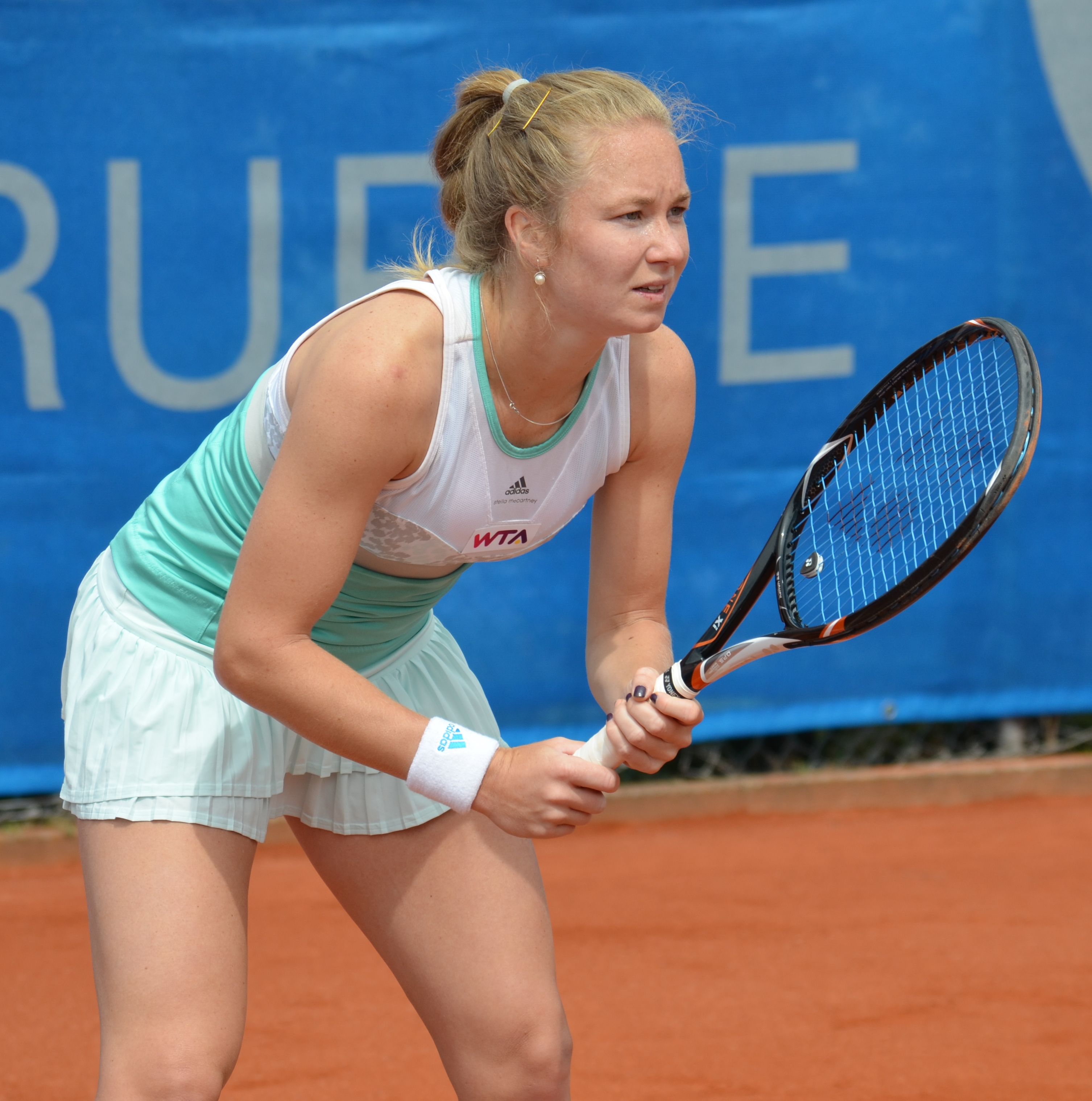 Julia Glushko in der Erstrundenbegegnung gegen Maria Elena Camerin bei der Qualifikation des Nürnberger Versicherungscup 2014